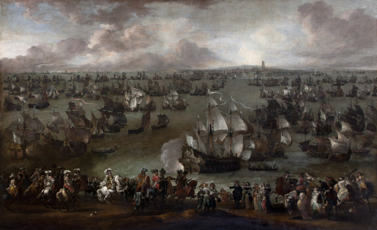 Louis XIV passant sa flotte en revue à Dunkerque et rencontrant les autorités de la ville. Tableau sans date, mais illustrant probablement la visite de Louis XIV à Dunkerque en 1680 avec sa montée à bord du vaisseau l'Entreprenant. Peinture hollandaise.